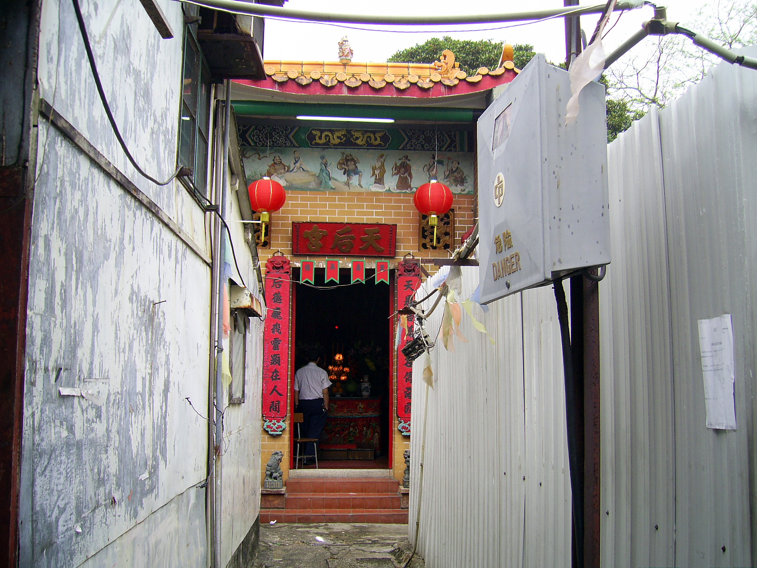 中文（香港）: 衙前圍村天后宮